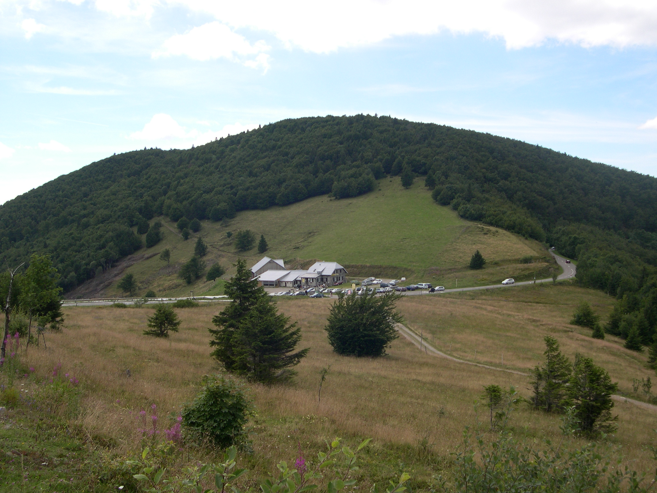 Le Storkenkopf et le Haag, 1235 m.